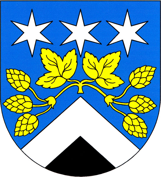 Znak obce Tuchořice